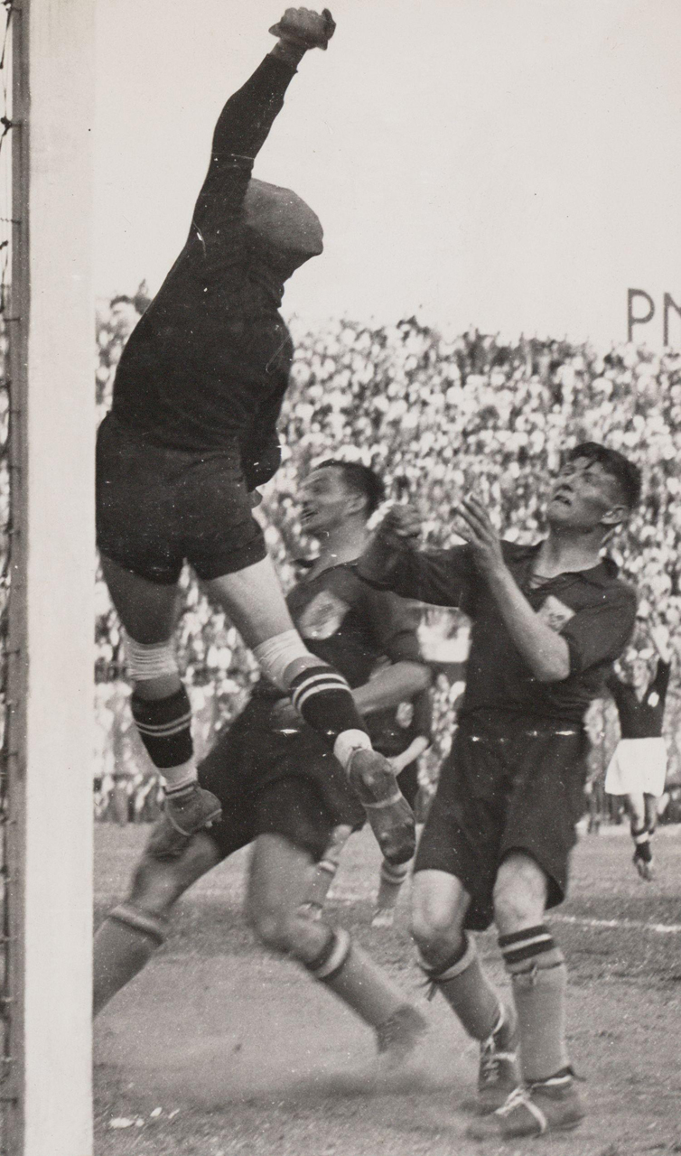 Nationaal Archief Beschrijving: De Zwitserse doelman Sechehaye komt in actie voordat Beb Bakhuys (midden) en Kick Smit gevaarlijk kunnen worden. Nederland - Zwitserland (2-3), gespeeld op 27 mei 1934 in het San Siro-stadion in Milaan tijdens de Wereldkampioenschappen in Italië. Datum: 27 mei 1934 Vervaardiger: fotograaf onbekend Bestanddeelnummer: 3929 URL: [1] Voor meer informatie over het Nationaal Archief: Voor meer foto's uit deze en andere collecties, bezoek onze Beeldbank:, U kunt ons helpen onze kennis van de fotocollecties te verrijken door tags en commentaren toe te voegen. Herkent u mensen of locaties of heeft u een bijzonder verhaal te vertellen bij één van de foto's, laat dan een reactie achter (als u ingelogd bent bij Flickr) of stuur een mailtje naar